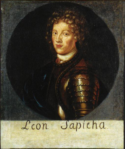 Беларуская (тарашкевіца): Партрэт Лявона Базыля Сапегі (Lavon Bazyl Sapieha) гербу «Ліс» (1652—1686), дзяржаўнага і вайсковага дзеяча Вялікага Княства Літоўскага, стольніка вялікага літоўскага, падскарбія надворнага літоўскага, генэрала артылерыі літоўскай